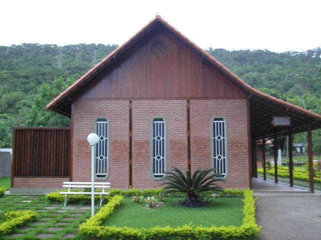 Imagem da I.C.M Estrada do Magarça, Estado RJ - Rio de Janeiro